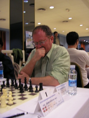 Kevin Spragget